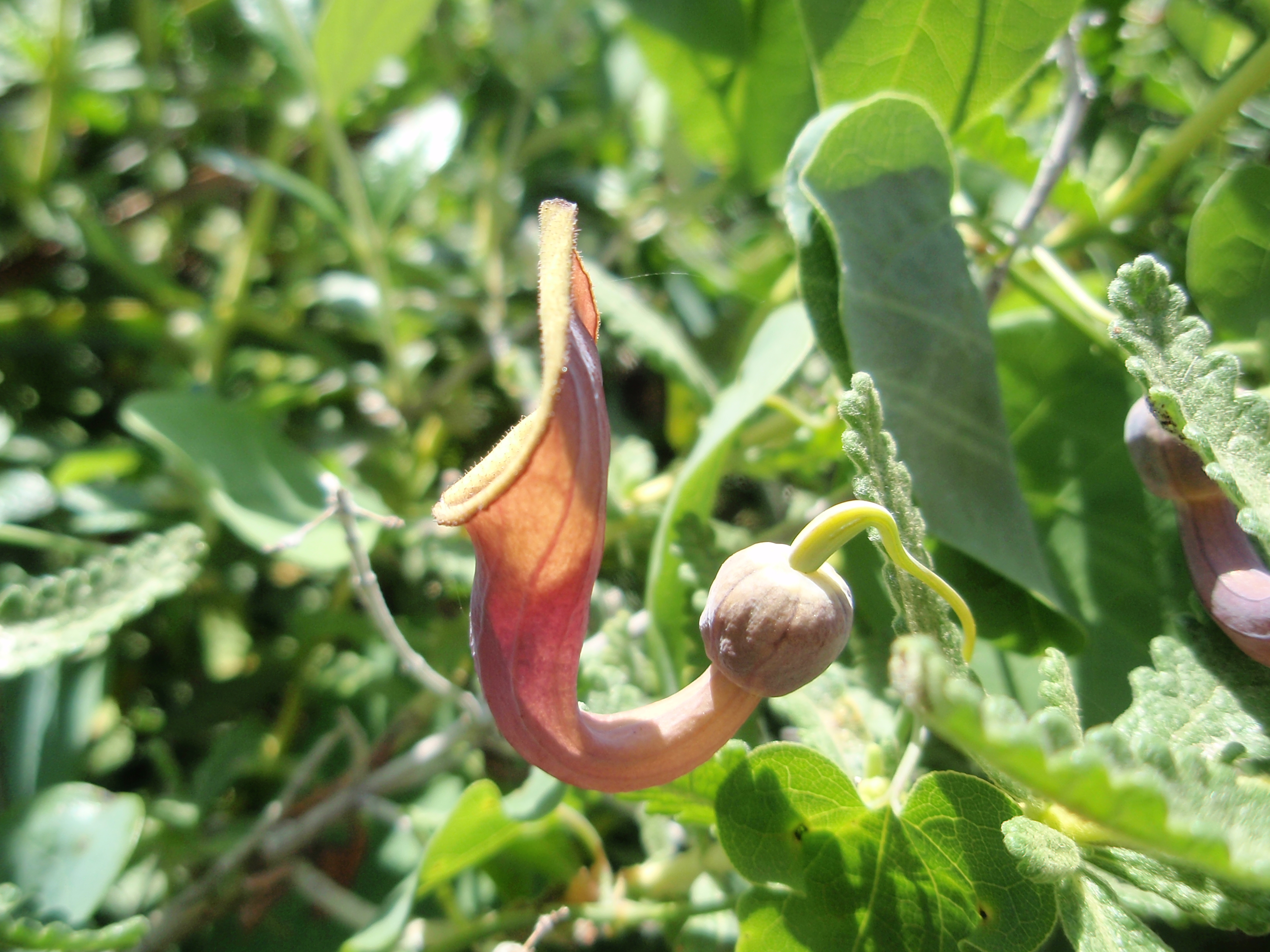 Aristolochia baetica, Gibraltar Affenfelsen